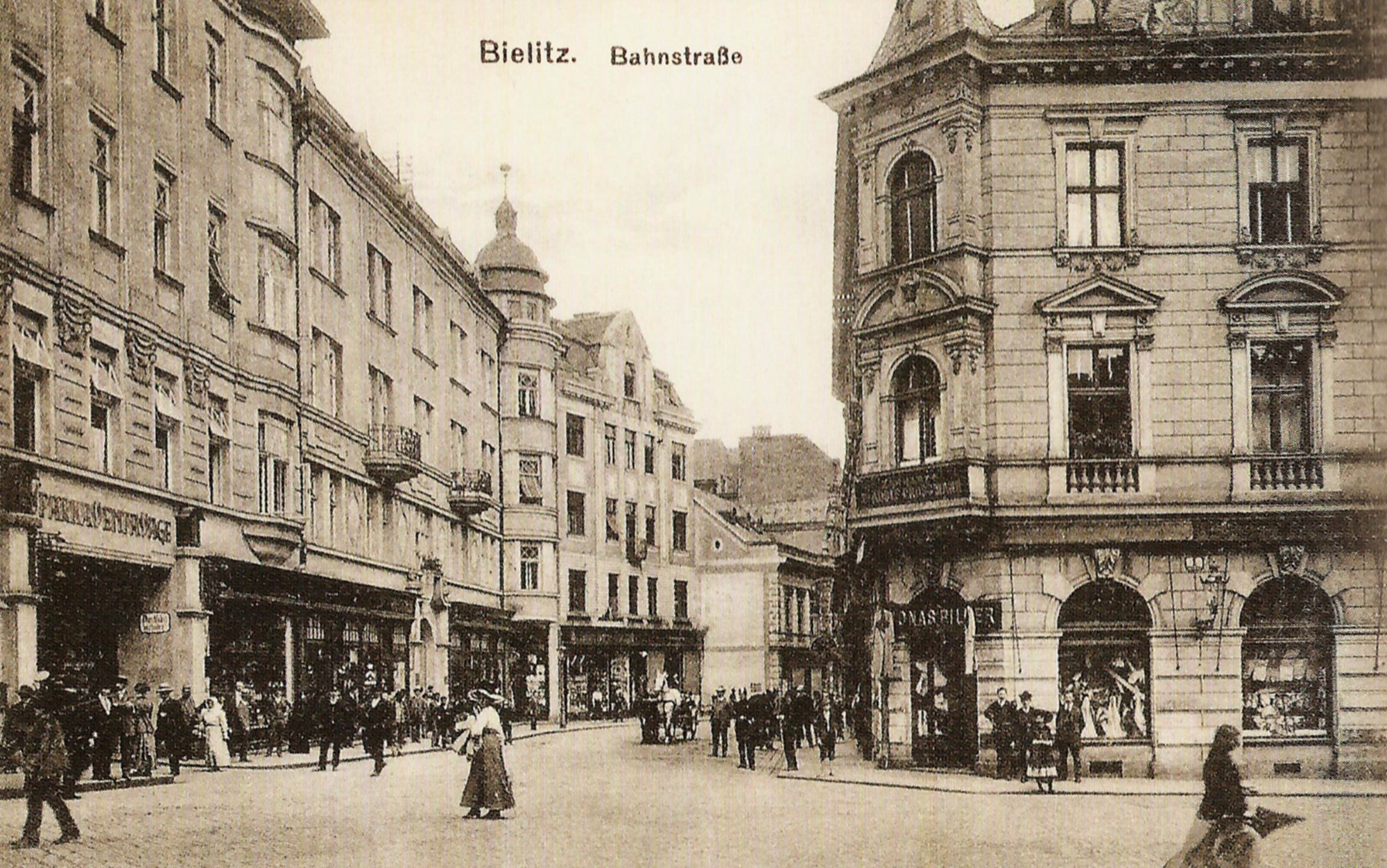 Bielsko-Biała. Bahnstraße (dziś Ulica Norberta Barlickiego) 3, 5 i Börsenplatz (dziś pl. Franciszka Smolki) 1.